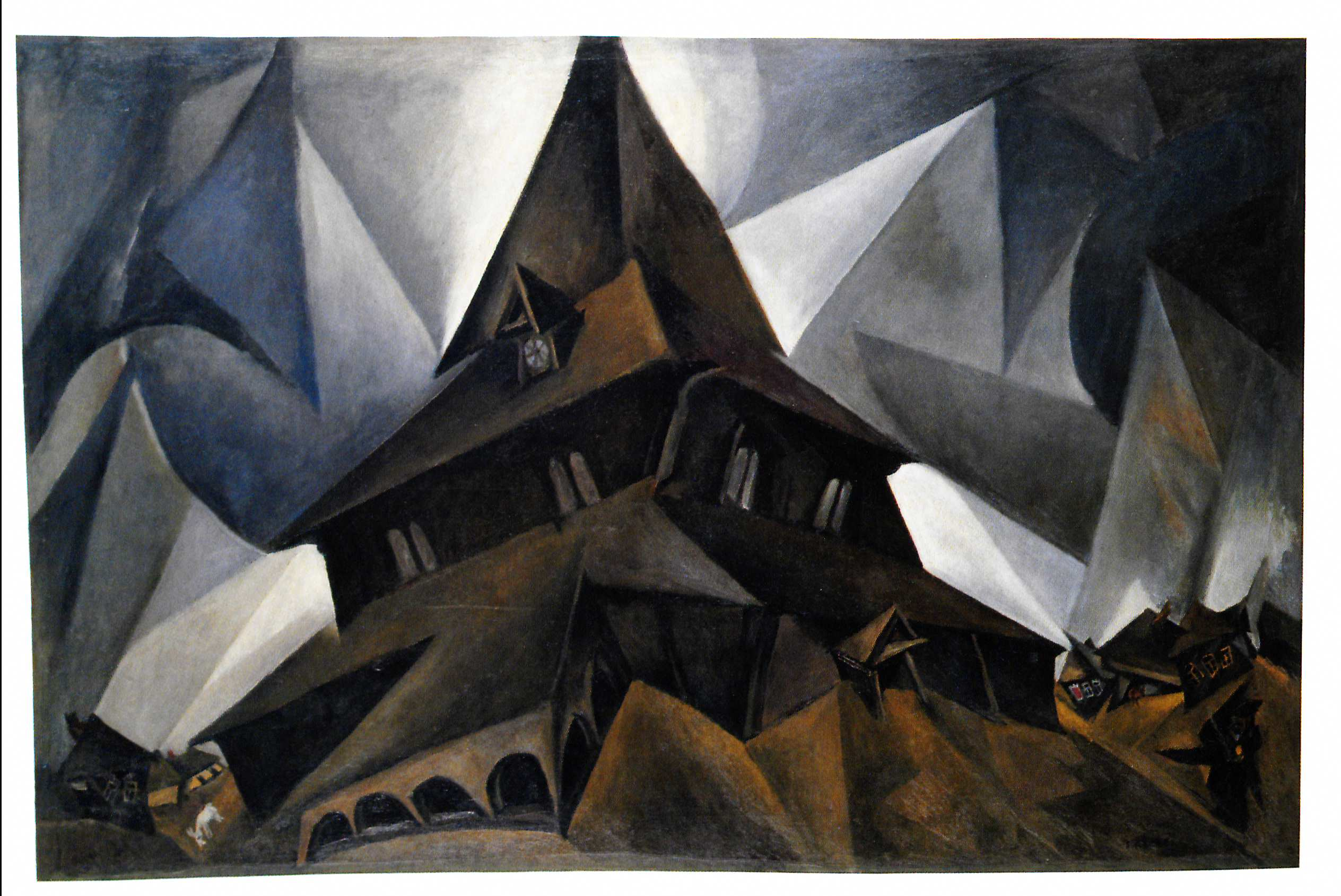 Issachar Ber Ryback Die alte Synagoge 1917 in Dobrowna, nahe Mogiljow. Collection of The Tel Aviv Museum of Art. Siehe File:Dubroŭna, Vysokaja synagoga. Дуброўна, Высокая сынагога (1905).jpg